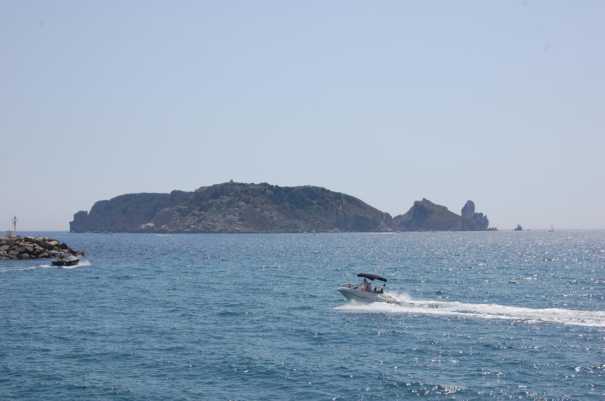 Islas Medes a la salida del Puerto de L´ Estartit